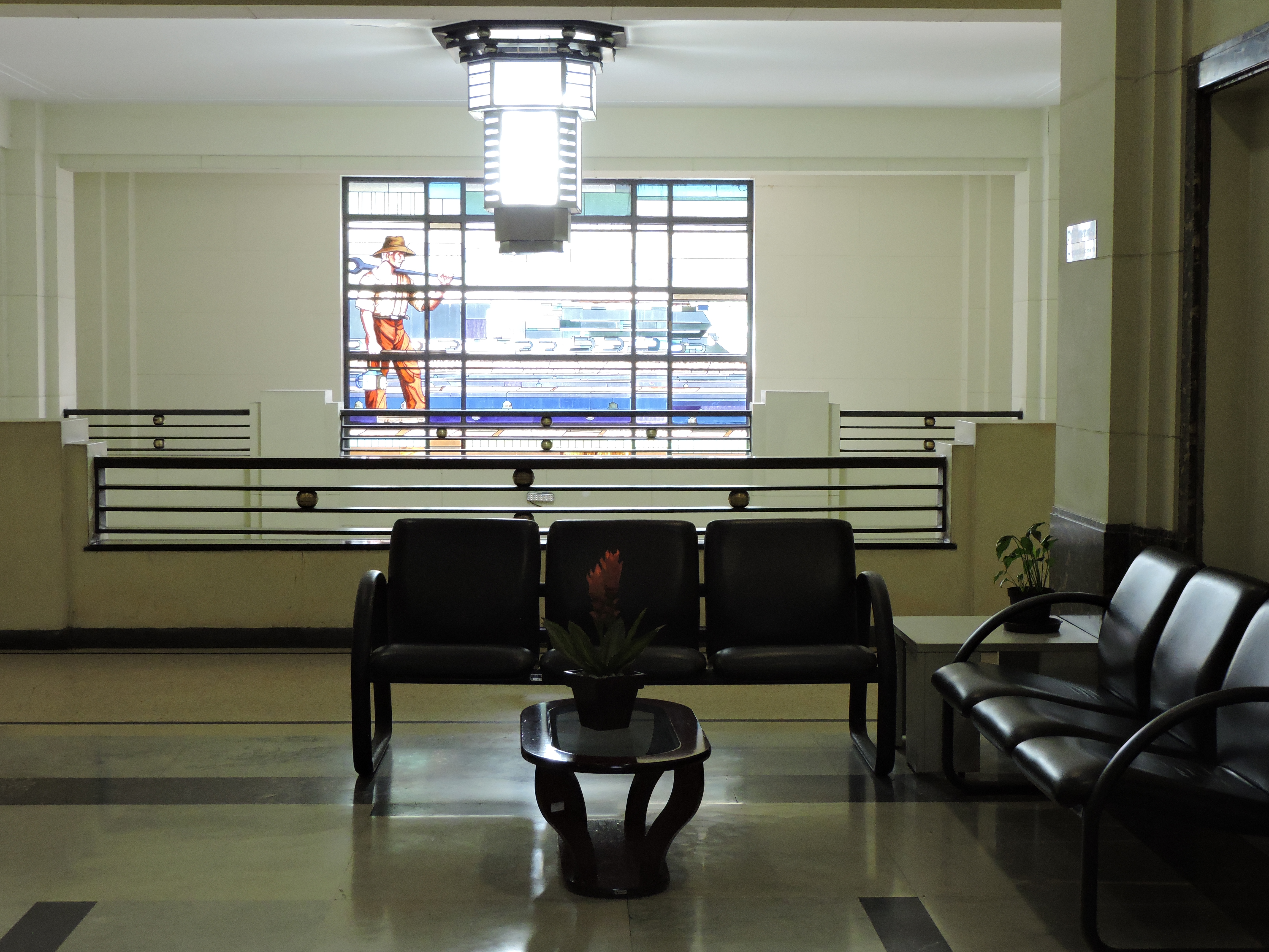 Detalhe interior do vitral que ocupa a fachada do Edifício Saldanha Marinho.